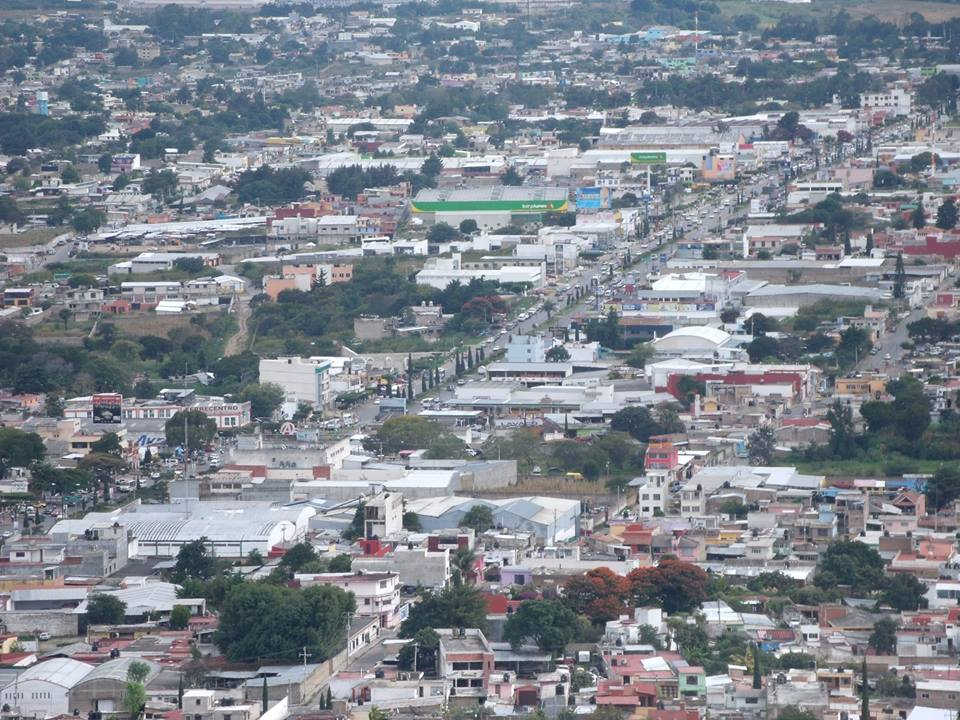 boulevard Belisario Domínguez